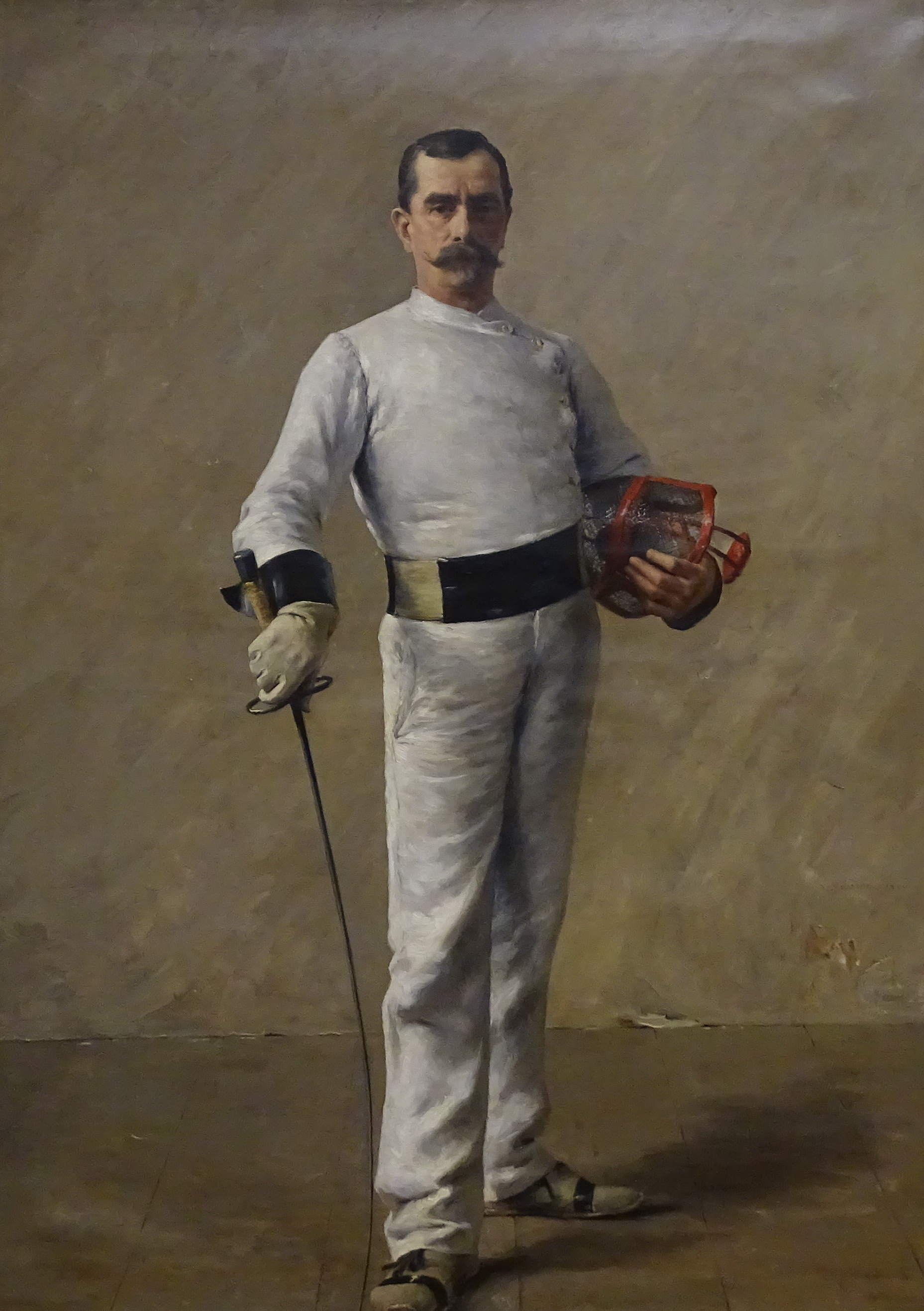 Le maître d'armes (M. Barthélémy) ; 1890